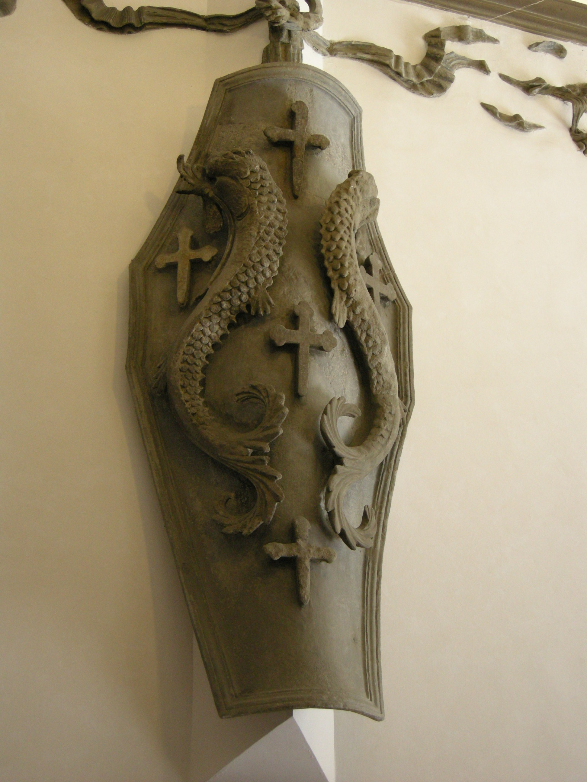 Palazzo pazzi della congiura 04 stemma donatello